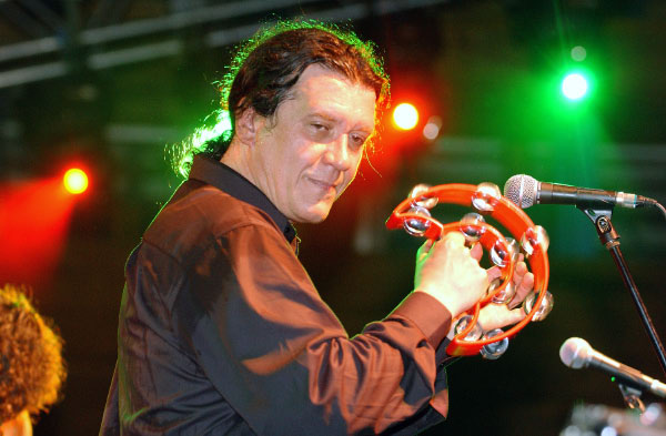 Koltay Gergely, a Kormorán együttes alapítója és vezetője. Testnevelési Főiskola.